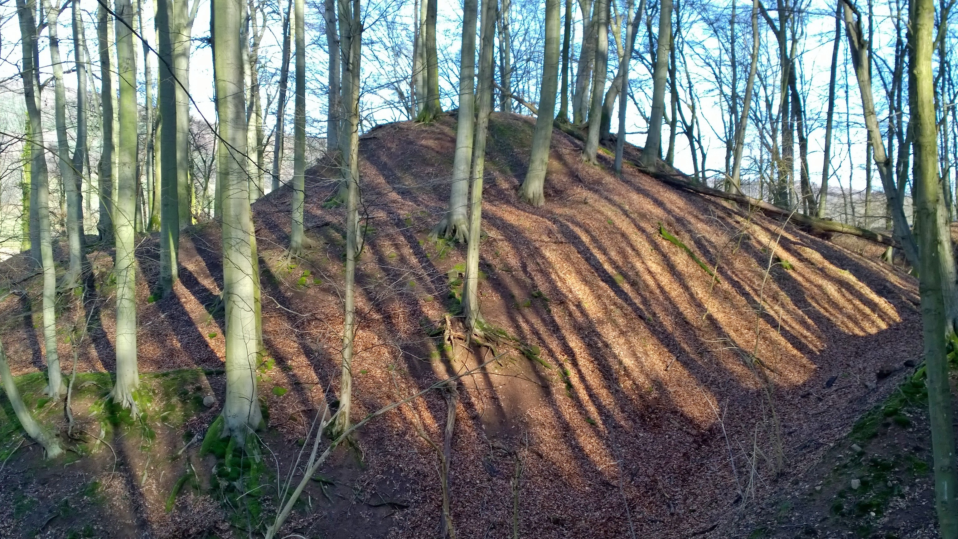 Blick auf den Burgstall Waldaschaff